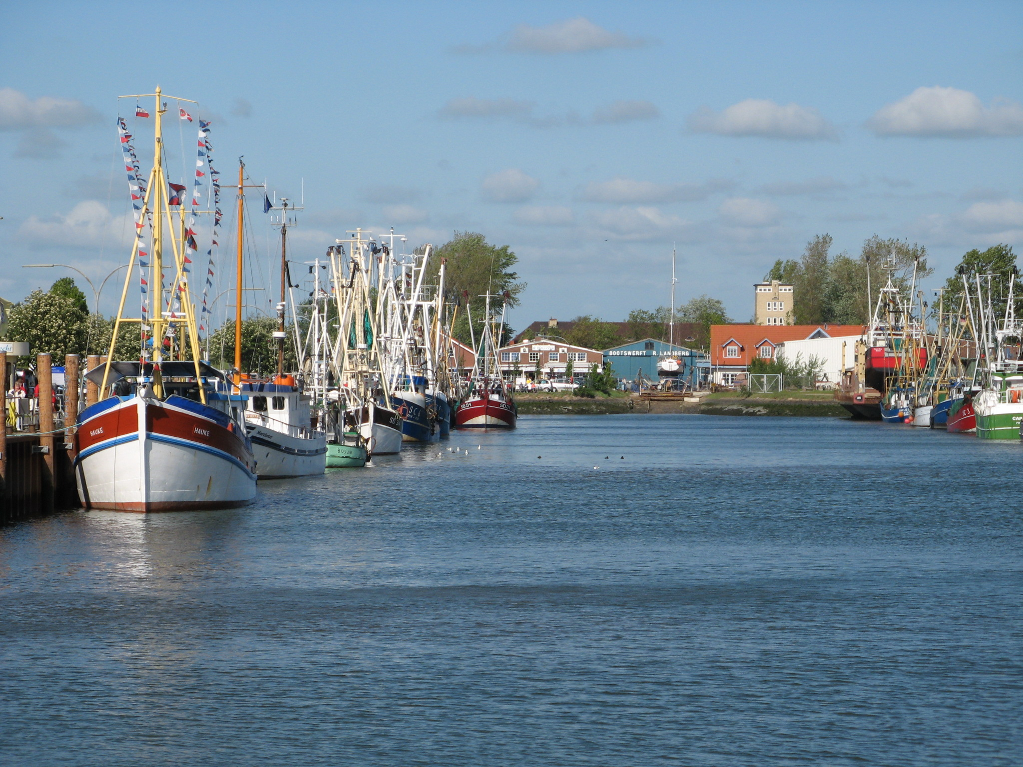 Büsum harbour SC = BÜSUM SD = FRIEDRICHSKOOG SC3 - JAN MAAT SC6 - KEEN TIED SD19 - CAP ARKONA SD31 - UTHOLM SD34 - KEEN TIED